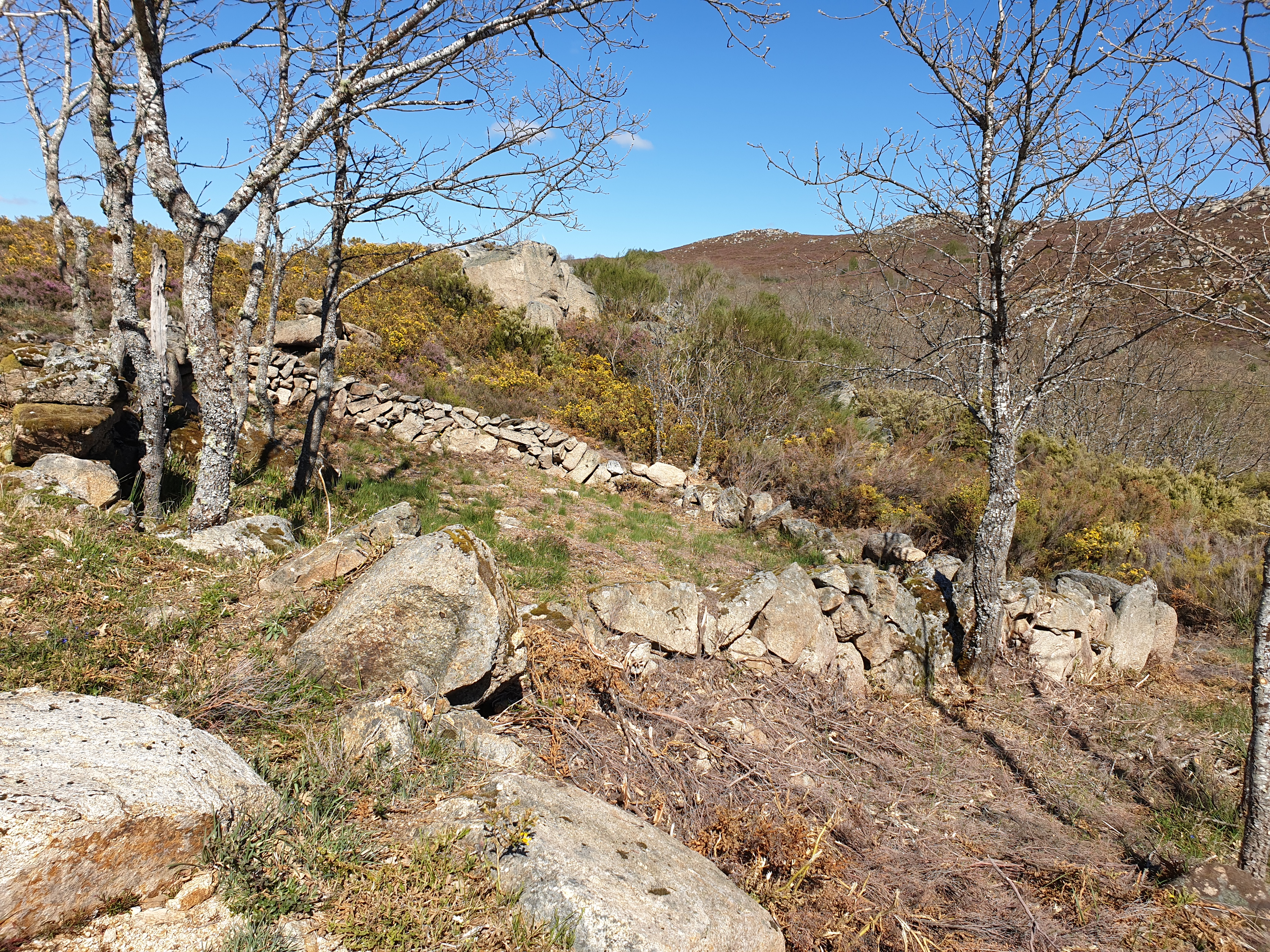 Forte muro circular